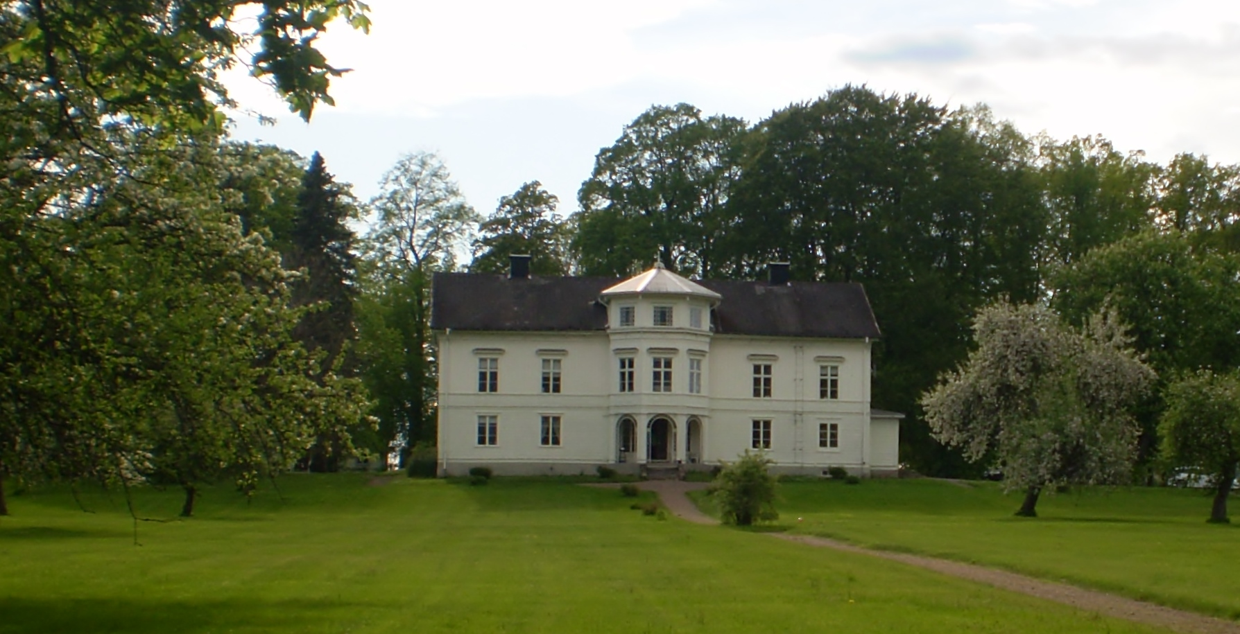 Körtingsbergs herrgård